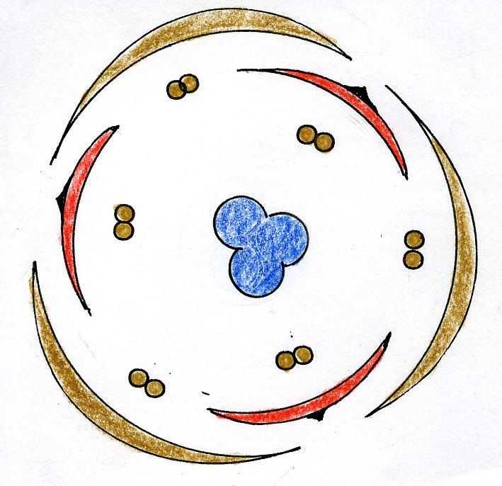 bloemdiagram Sterhyacint (Scilla), Scilla floral diagram